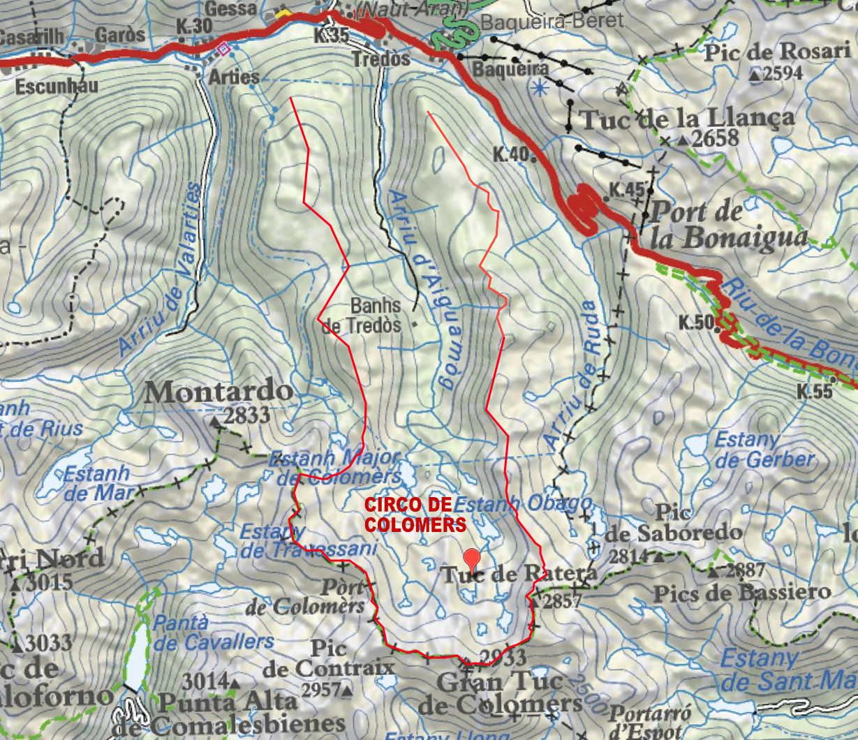 Dibujo de la carena del circo de Colomers sobre un mapa del ICC, mediante Instamaps